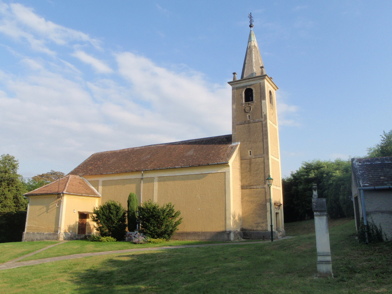 Peresznye St. Egyed Kirche